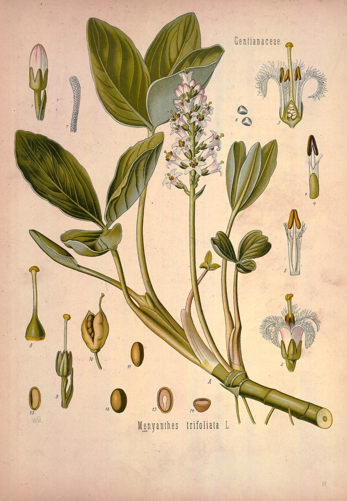 Fieberklee. A Pflanze in natürl. Grösse; 1 Blüthenknospe, vergrössert; 2 Blüthe, desgl.; 3 dieselbe im Längsschnitt, desgl.; 4 u. 5 Staubgefässe mit Theil der Krone und Kelch, von verschiedenen Seiten, desgl.; 6 Pollen, desgl.; 7 oberer Theil eines die innere Seite der Blumenlappen bedeckenden Zottenhaares desgl.; 8 Stempel, desgl.; 9 abgeblühte Blüthe, desgl.; 10 reife geöffnete Frucht, desgl.; 11 u. 12 Same von verschiedenen Seiten, desgl.; 13, 14, 15 derselbe im Längs- und Querschnitt, desgl.